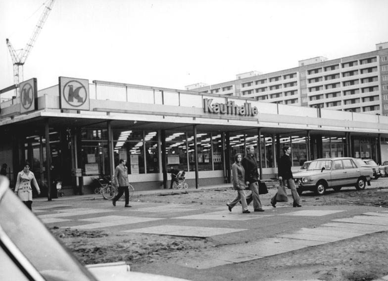 Dresden, Johannstadt, Kaufhalle ADN-ZB Häßler 16.4.1974 Dresden: Neue Kaufhalle- Von einer neuen Kaufhalle konnten die Einwohner vom Neubaugebiet Dresden-Johannstadt Besitz ergreifen. Sie ist mit ihren 1200 Quadratmetern eine der größten Einkaufsstätten der Elbestadt. (Bitte beachten Sie auch Foto N0416-0024) (Am 16.4.1974 findet in Dresden-Mitte eine Wählervertreterkonferenz statt)